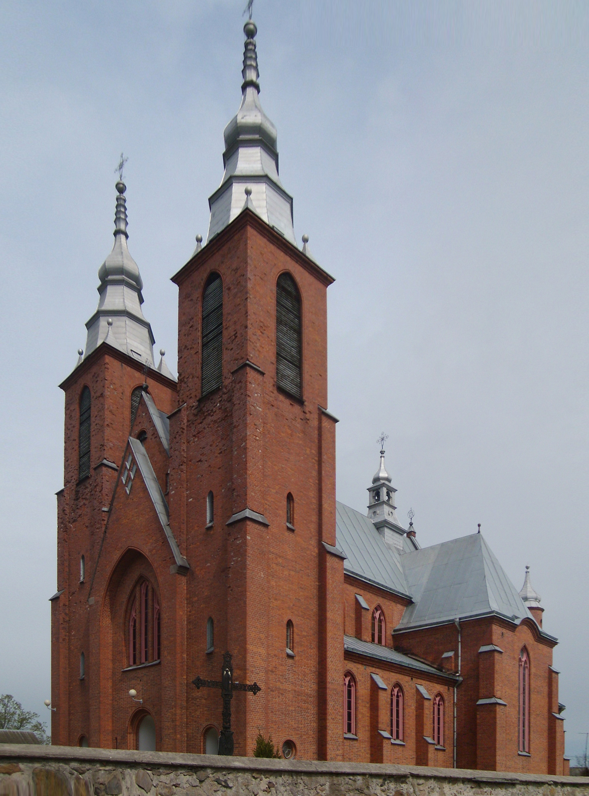 Беларуская (тарашкевіца): Касьцёл Яна Хрысьціцелядэкаратыўнае аздабленьне інтэр’еру:бакавы алтар,хрысьцільня ў правым нефе. в. Мсьцібава This is a photo of Belarusian heritage monument. Reference number: 412Г000110 ( WLM)